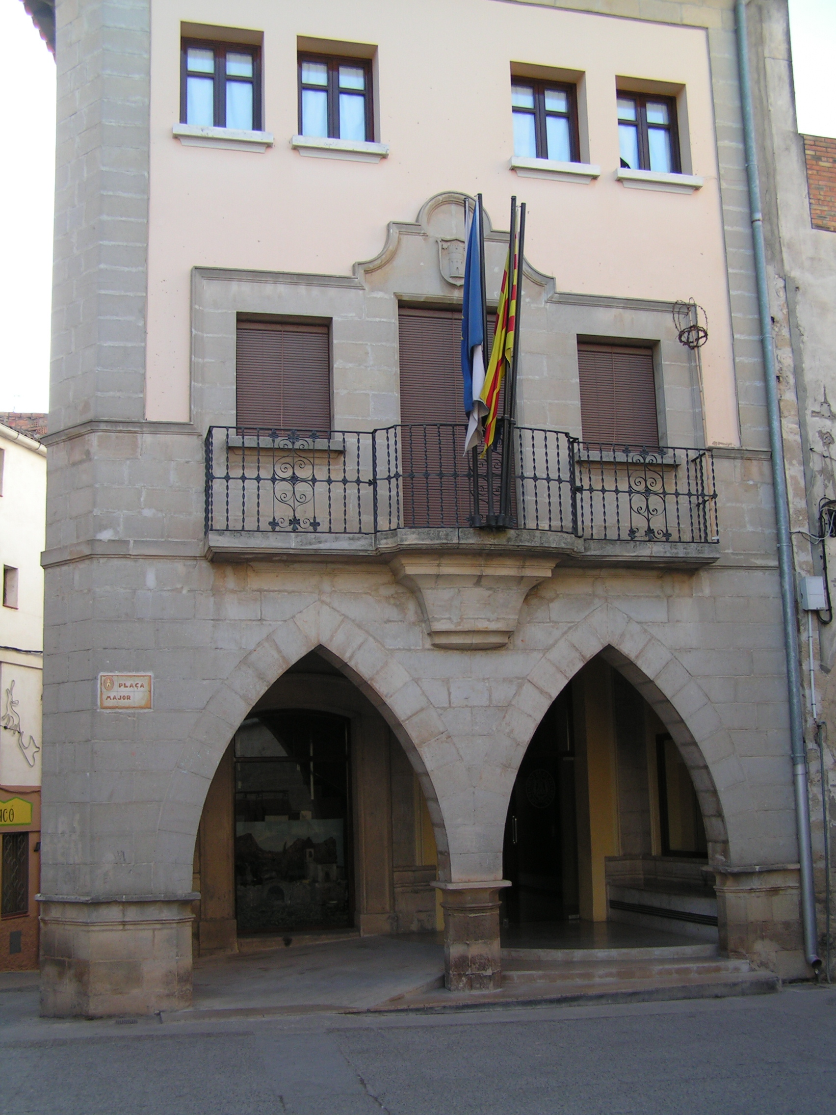 Ajuntament de La Fatarella